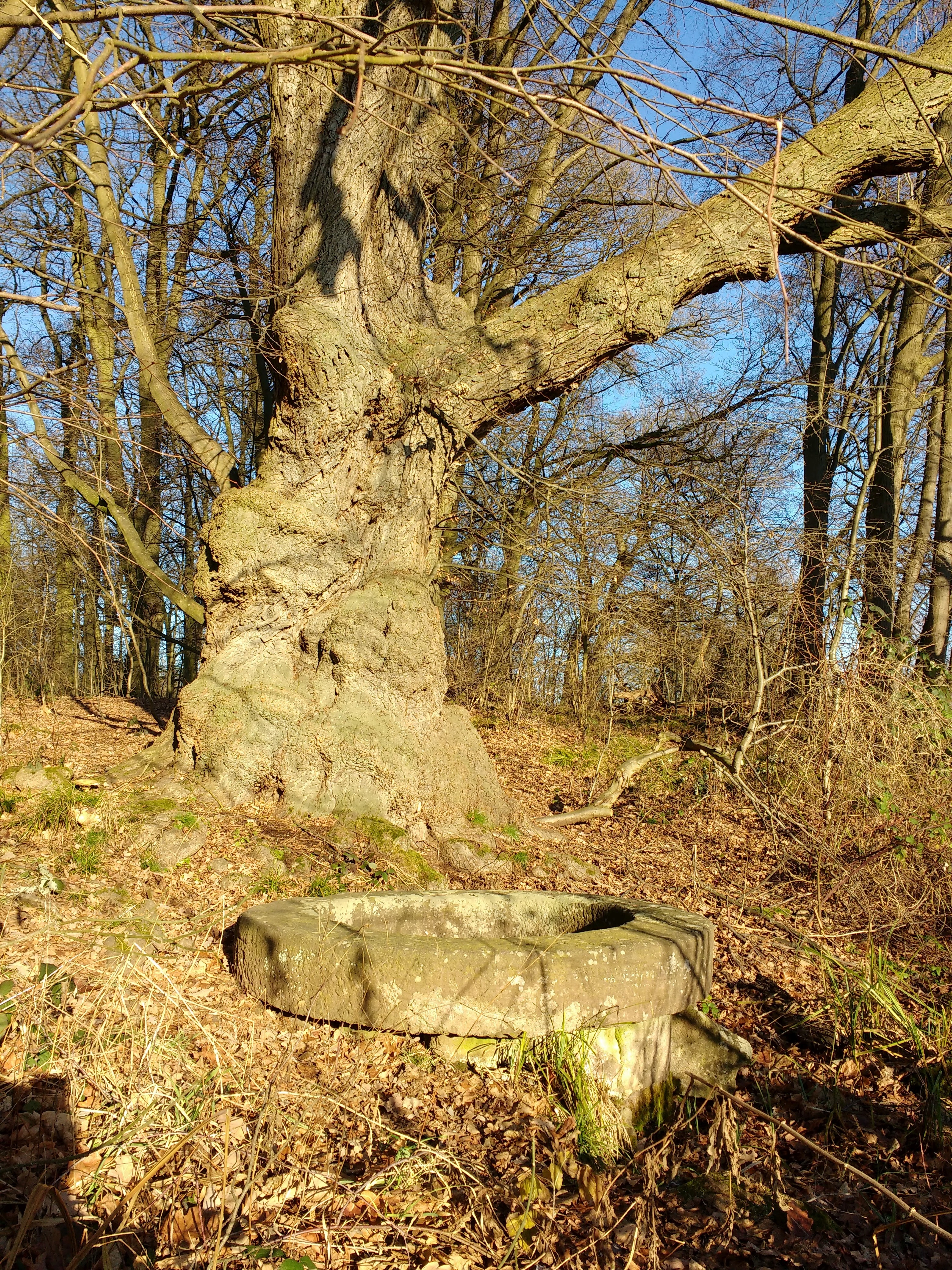 Der Kirchborn in der Gemarkung Götznehain